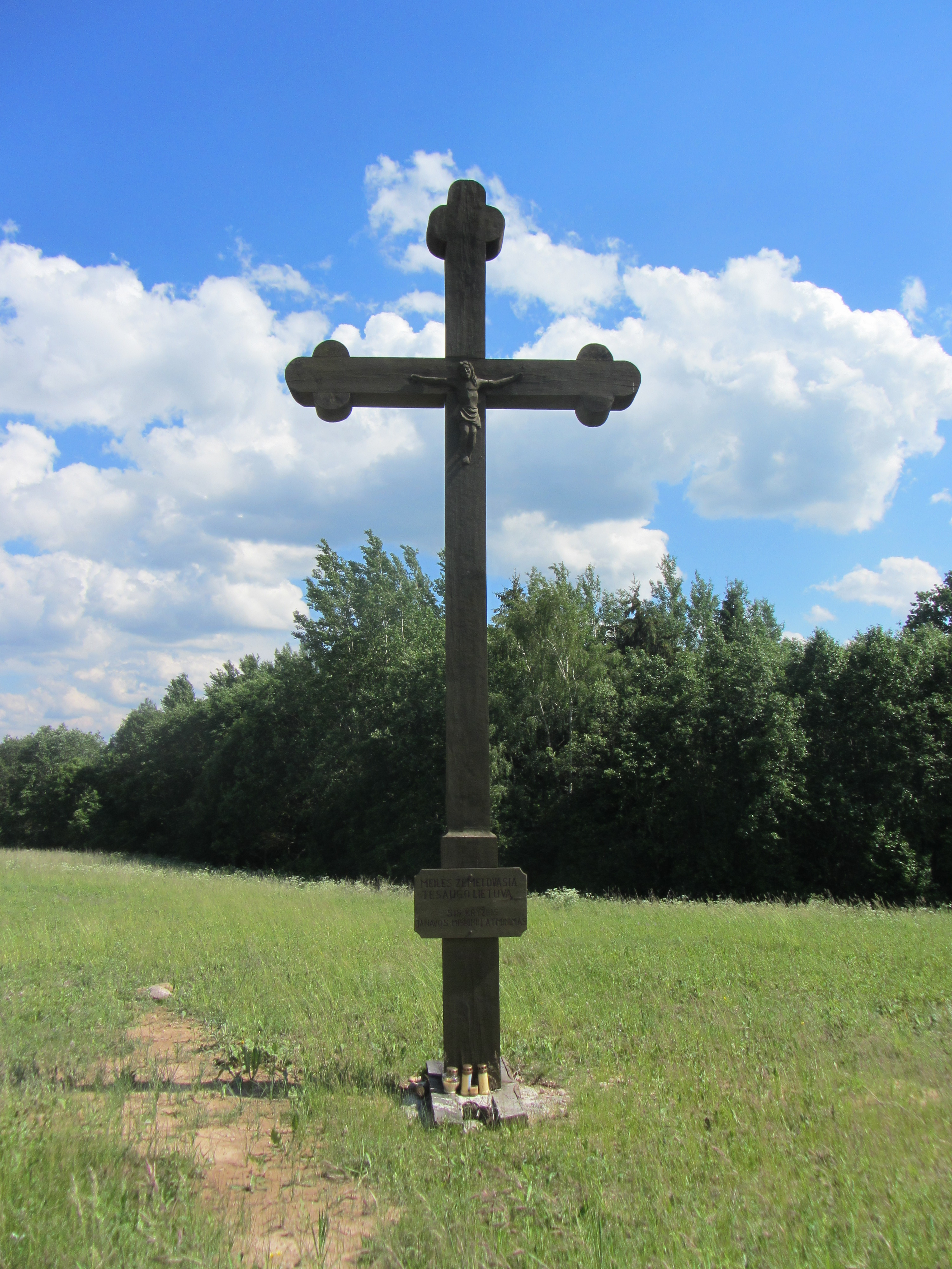 Degučių sen., Lithuania